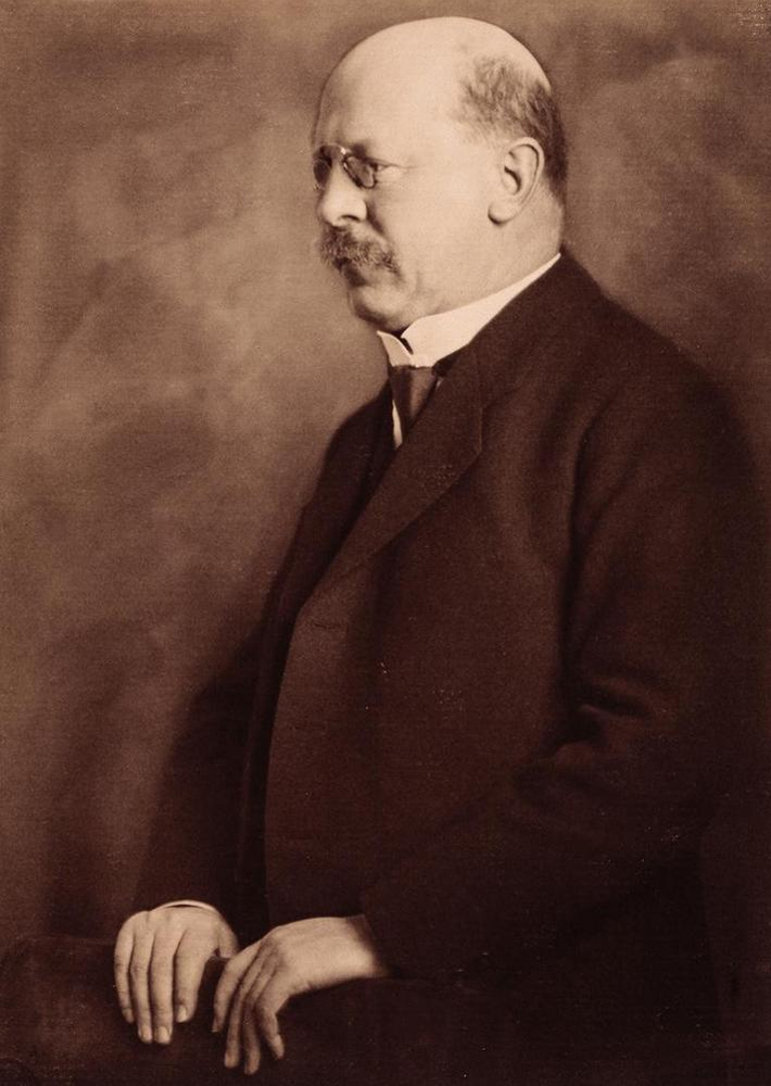 Karl Scheurer (Chromolithografie mit Sepia nach einer Fotografie)